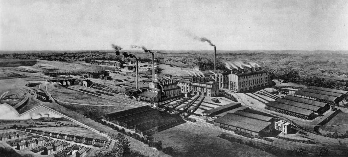 Briefkopf der Gerwerkschaft Donatus, Liblar bei Köln Die Darstellung zeigt die Braunkohlegrube und drei Brikettfabriken, sowie eine Arbeitersiedlung. Um 1900 waren hier 747 Arbeiter beschäftigt